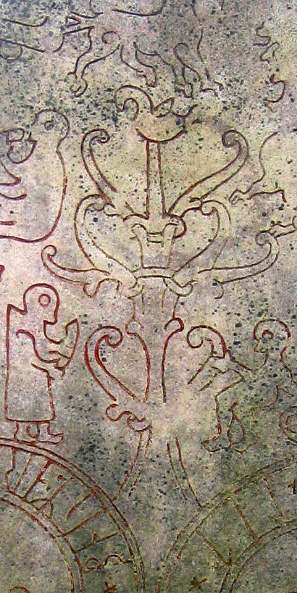 Kopia av den förstörda runstenen Gs 19 vid Ockelbo kyrka. Detalj.